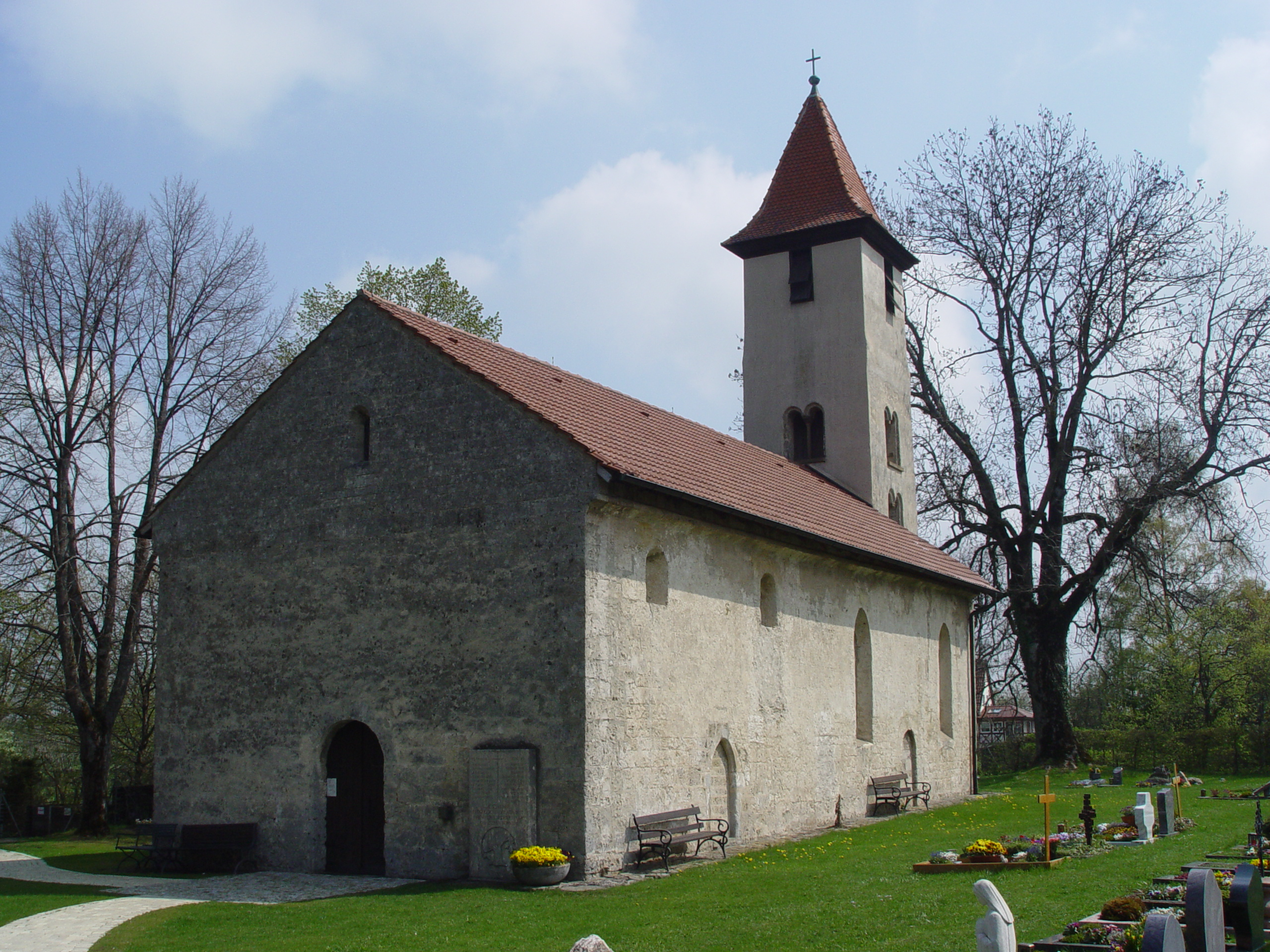 Die St.-Michaelskirche in Albstadt-Burgfelden